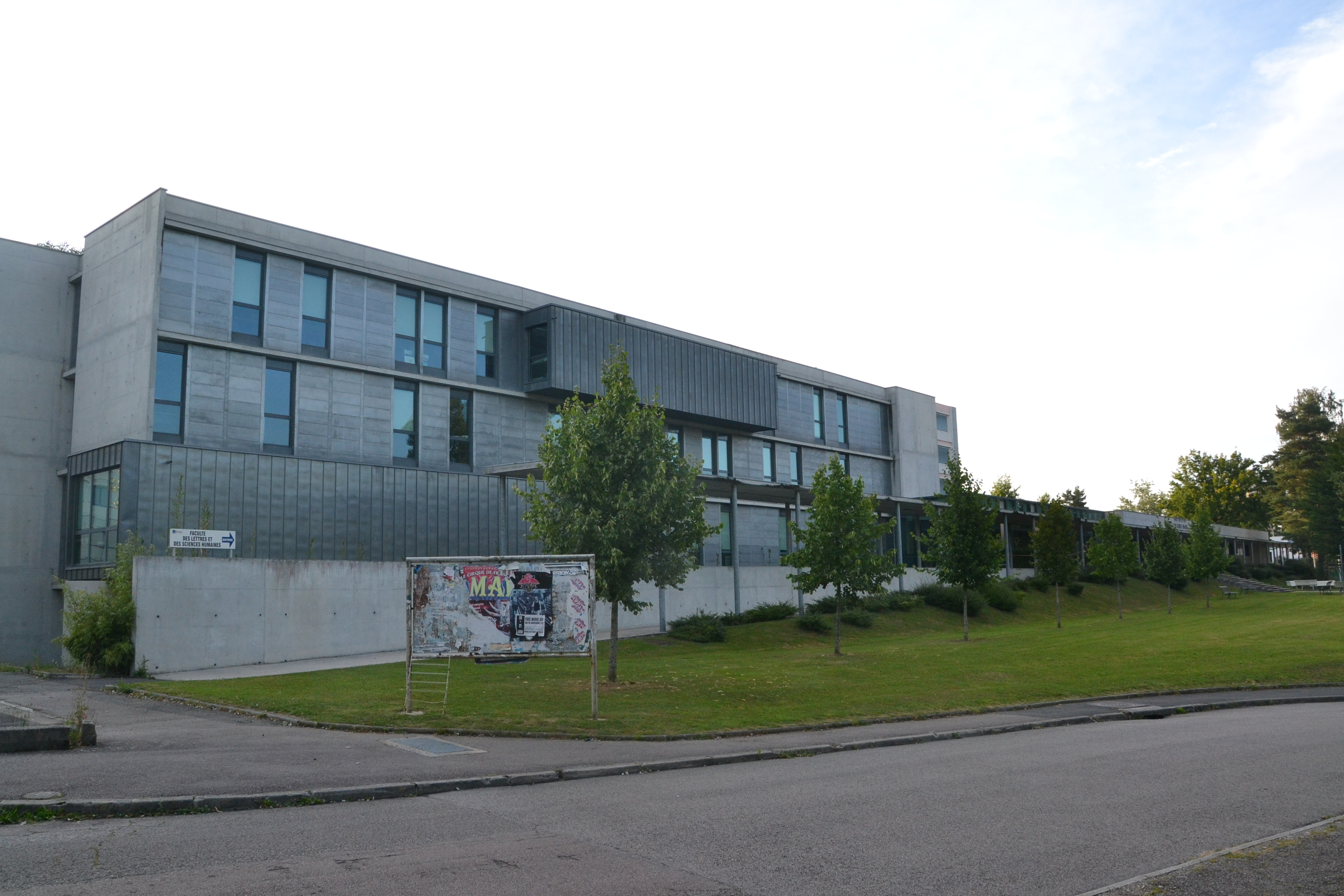 Faculté de lettres et sciences humaines de l'Université de Limoges (Haute-Vienne, France).